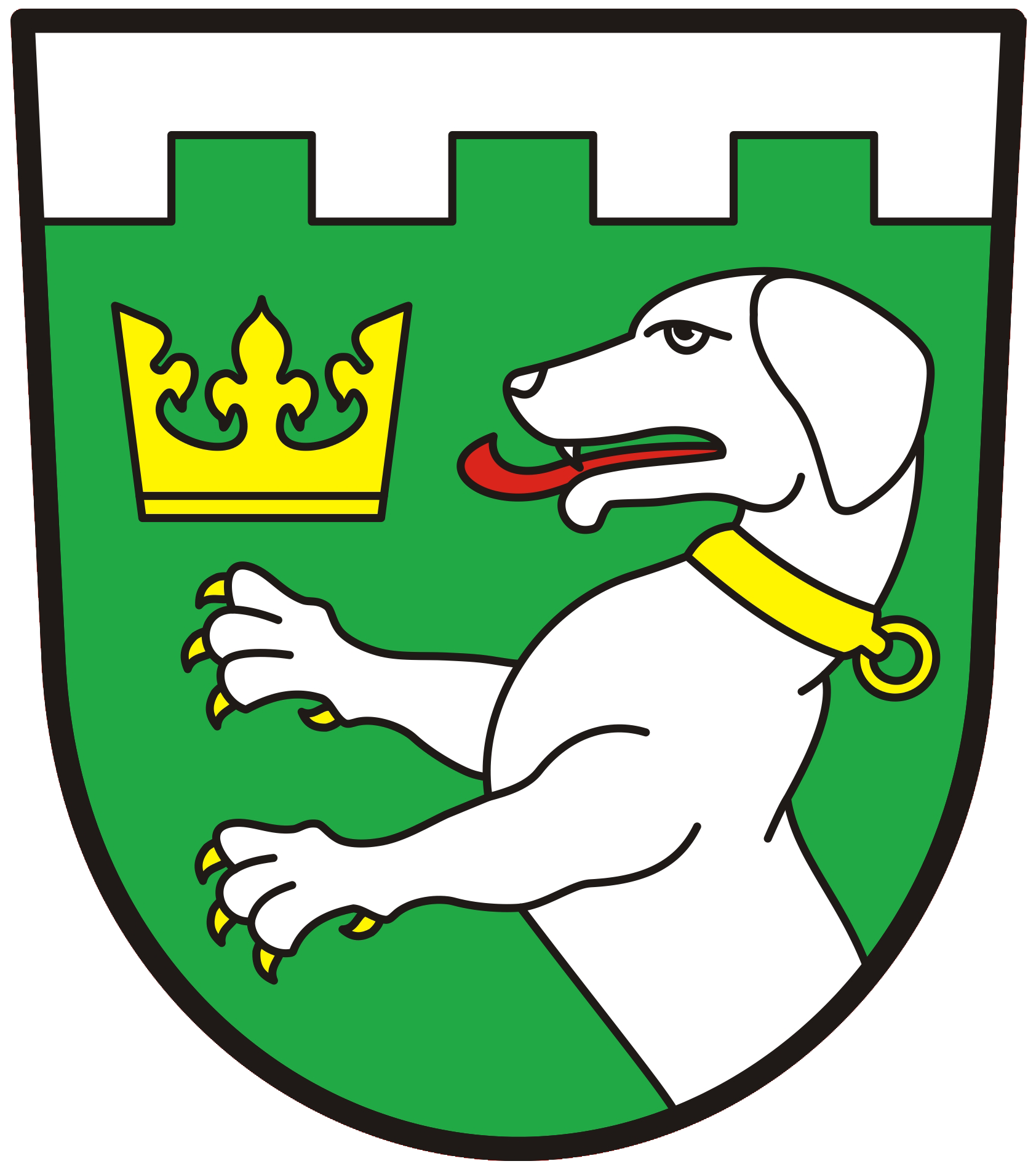 Znak obce Tvrzice